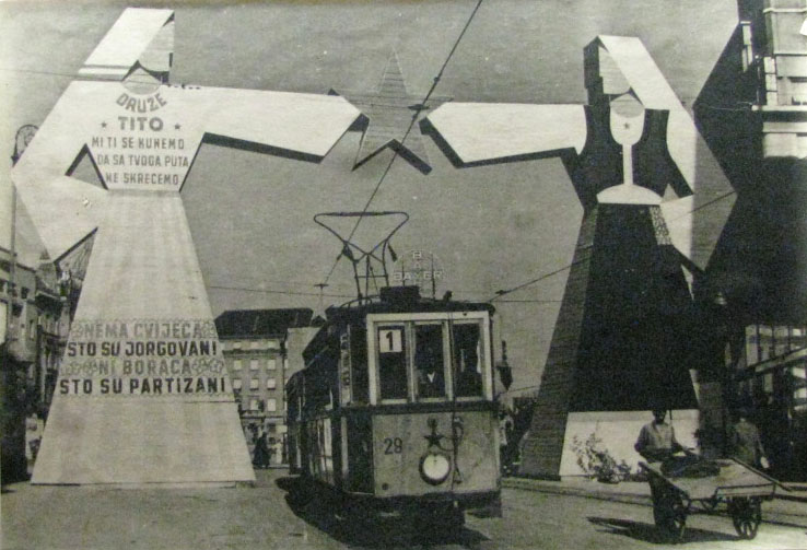 Tramvaj na Trgu bana Jelačića vozi ispod skulptura drugarica